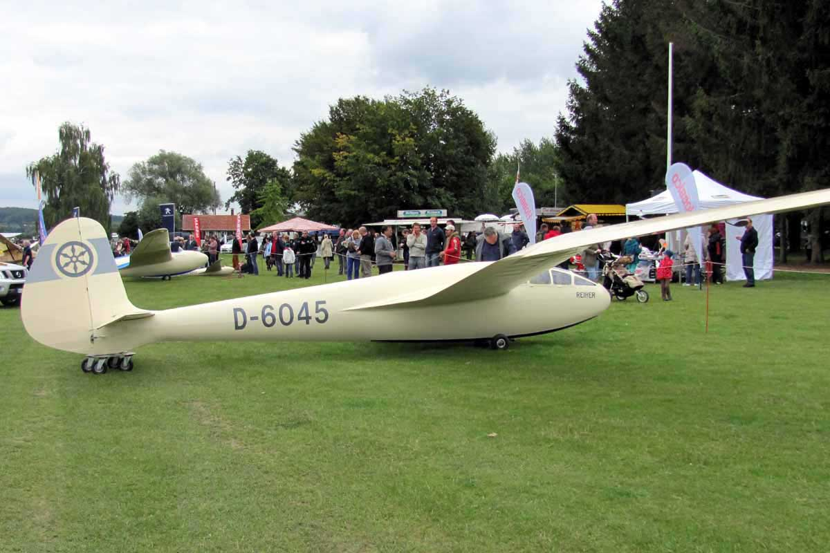 DFS Reiher auf den Luft-Sport-Tagen Bückeburg am 21.09.2013